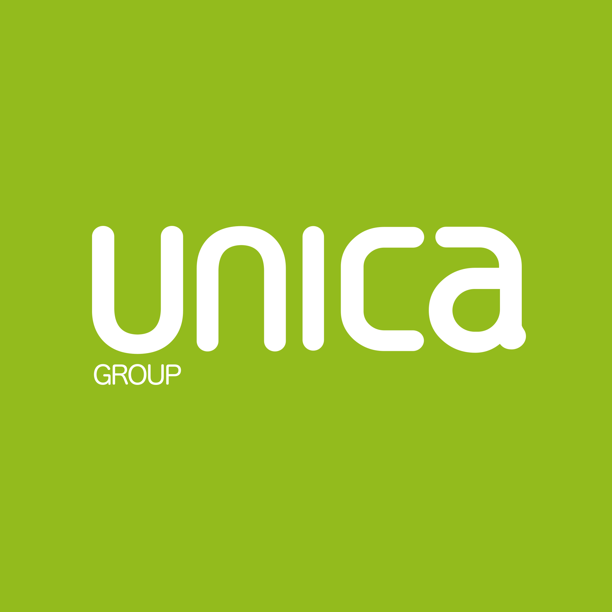 Logo de Unica Group SCA